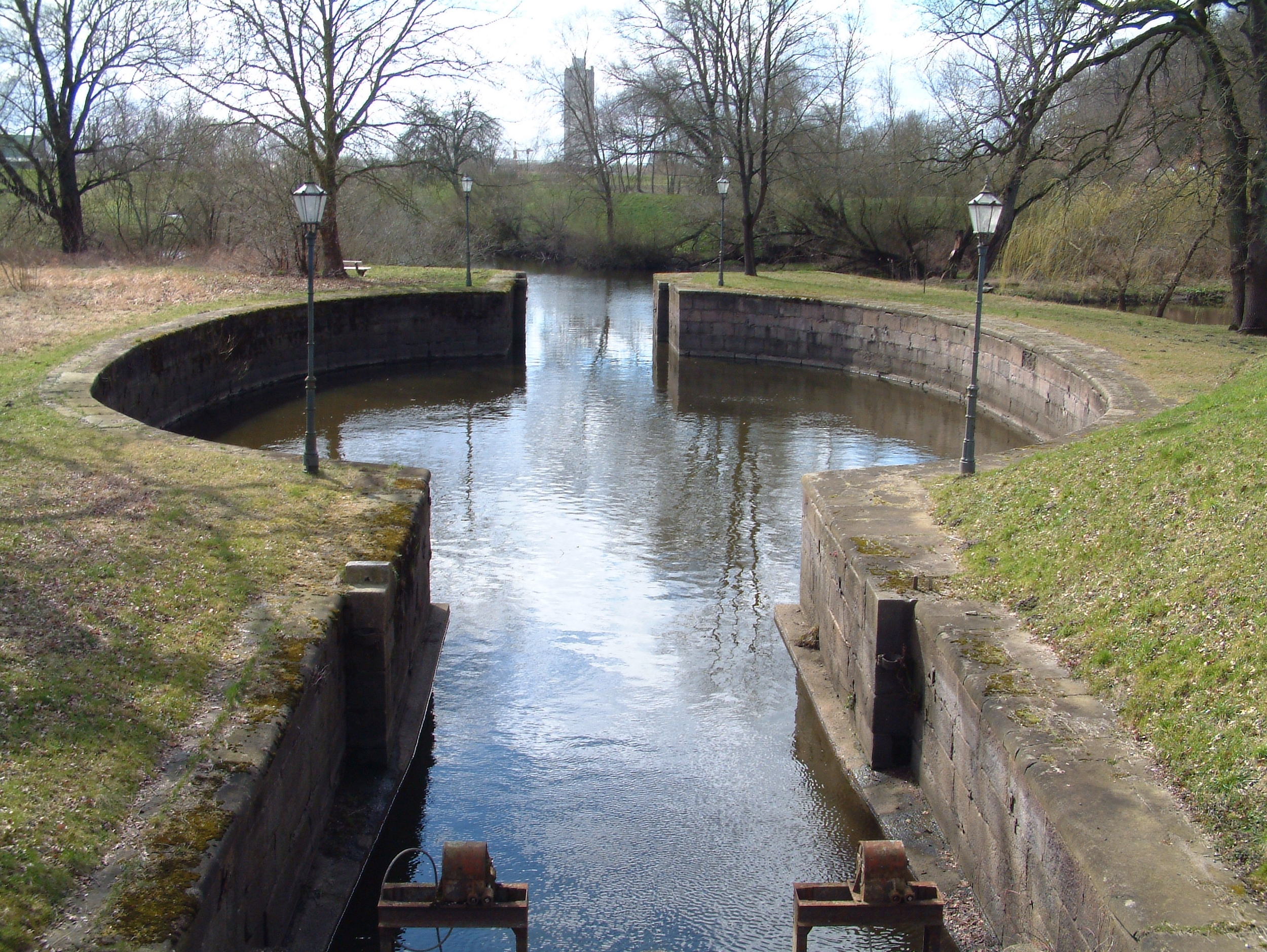 Palmschleuse Lauenburg, April 2015